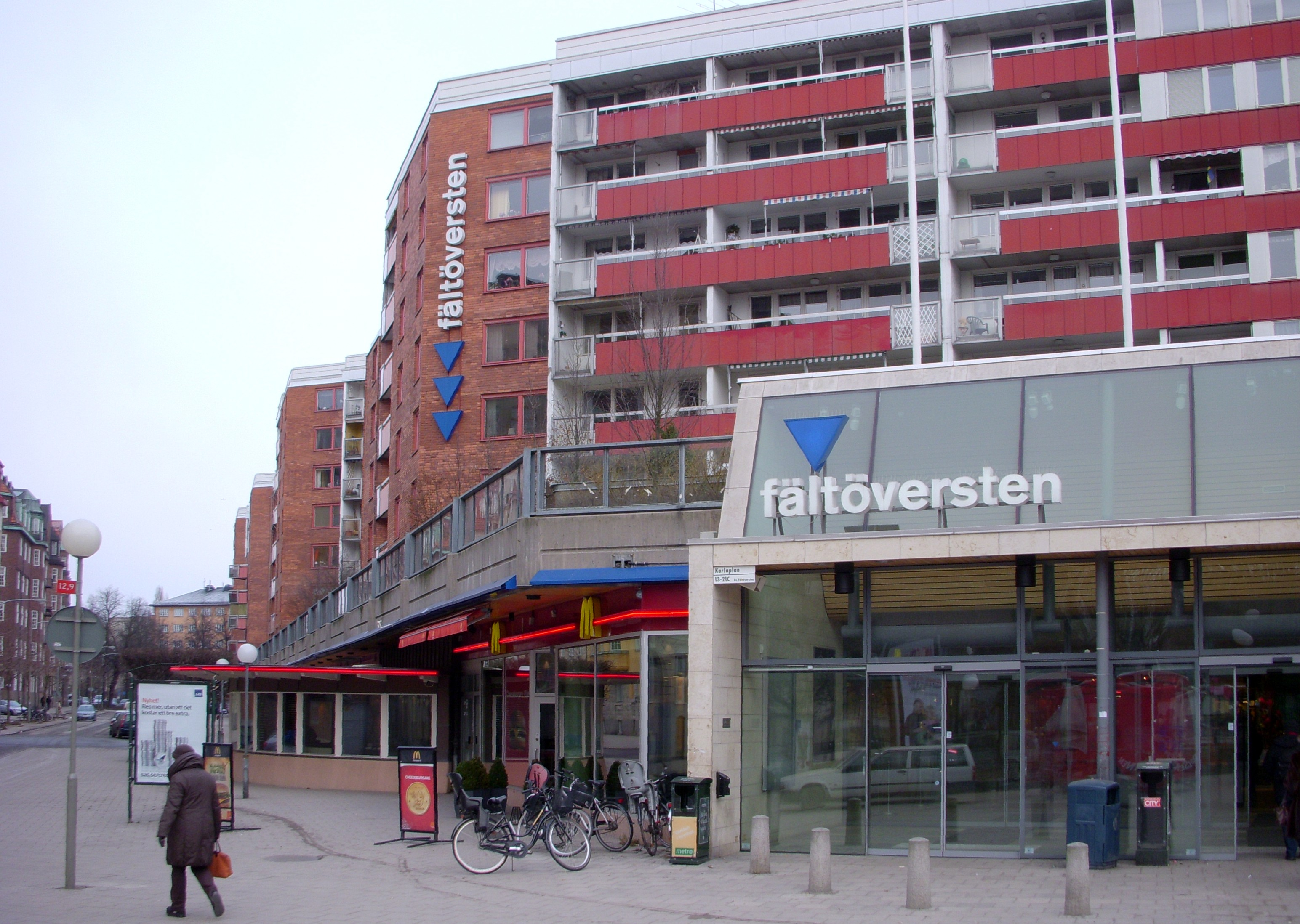 Kvarteret "Fältöversten" på Östermalm i Stockholm